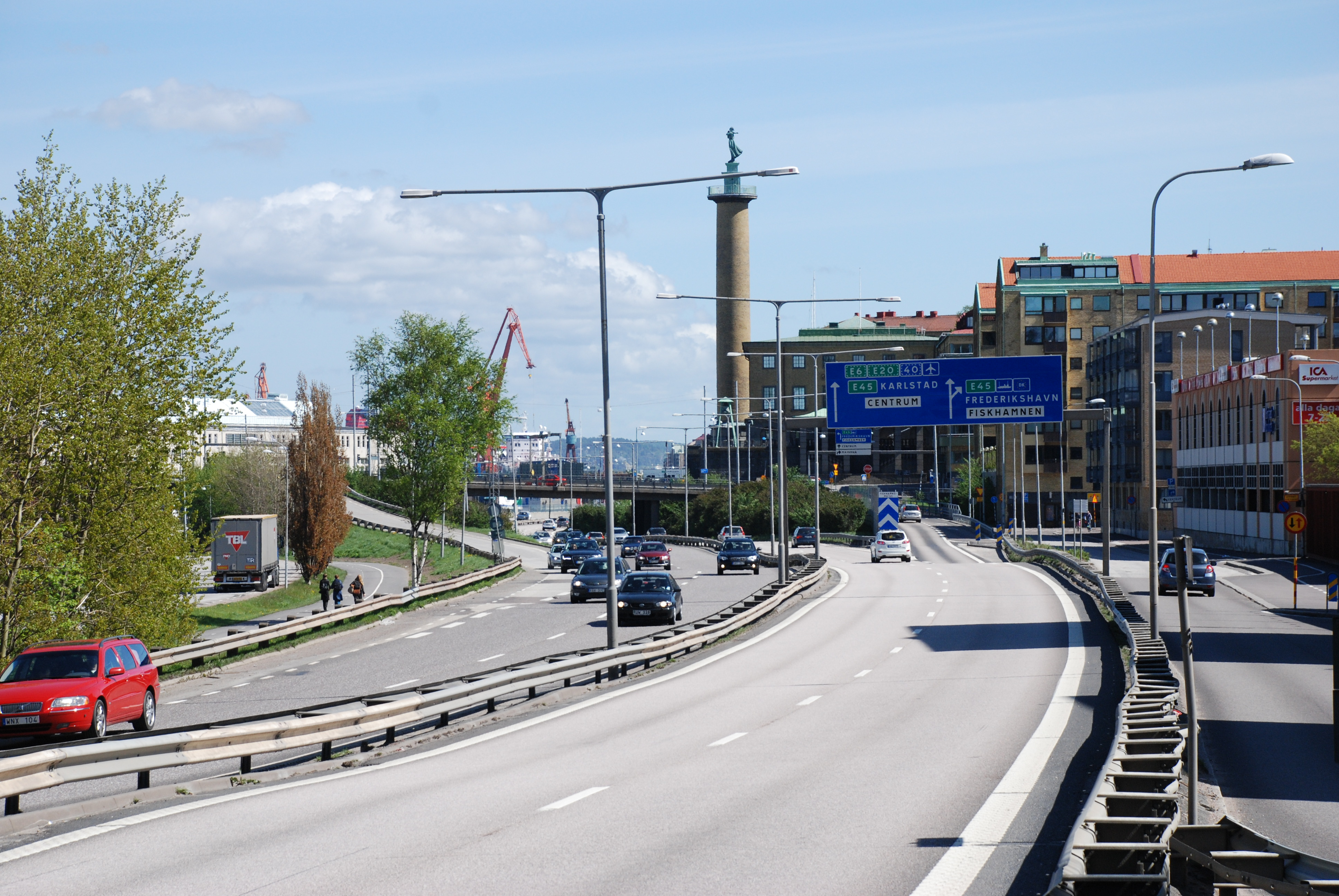 Oscarsleden vid Såggatan i riktning mot centrum av Göteborg.